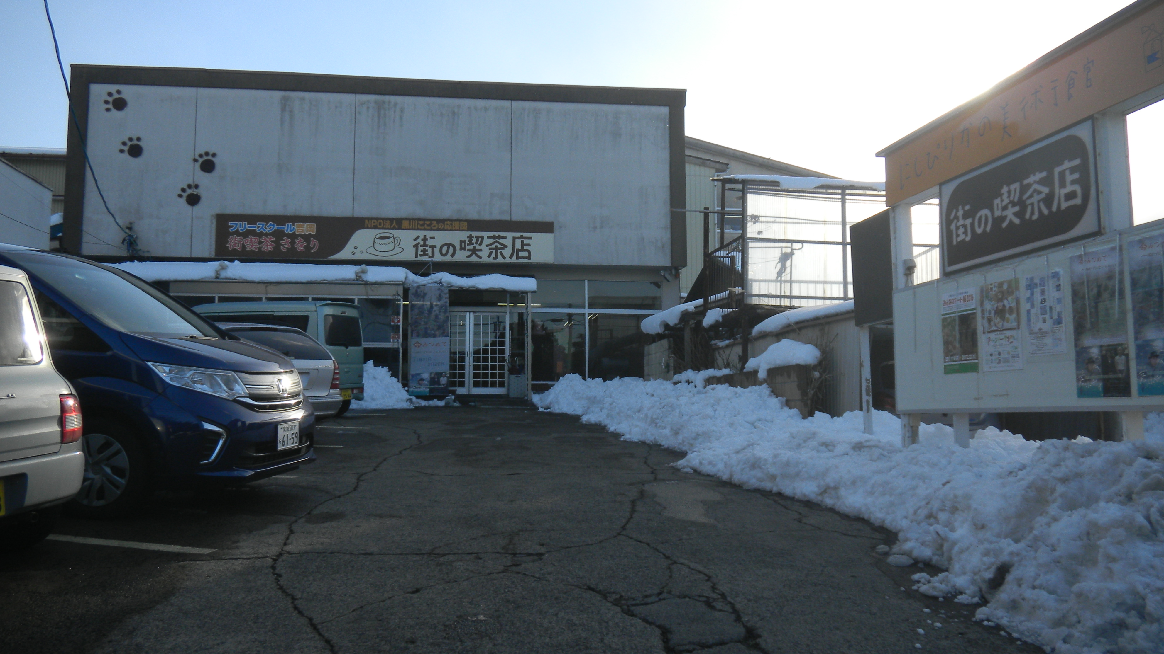 にしぴりかの美術館